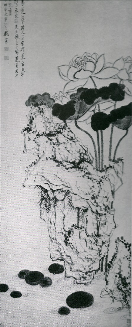 Lotus et rocher, rouleau en hauteur, encre sur papier. 151x62cm, du peintre chinois Chen Hongshou. (1598-1652) Shanghai, Musée.